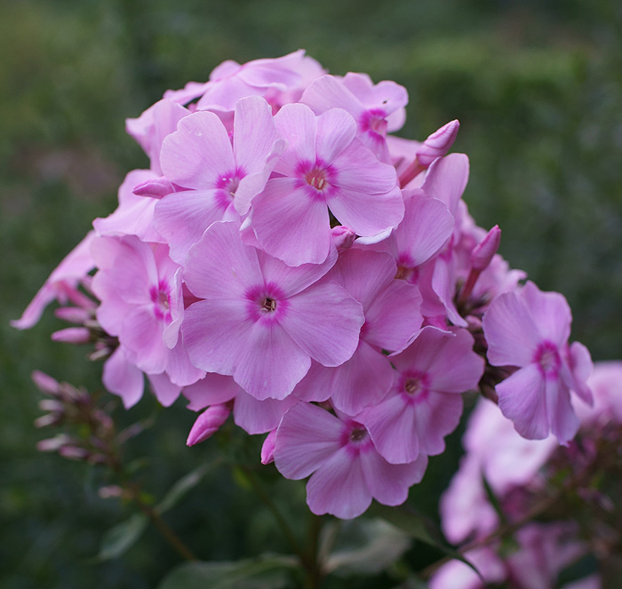 Флокс метельчатый 'Клавдия Шульженко'